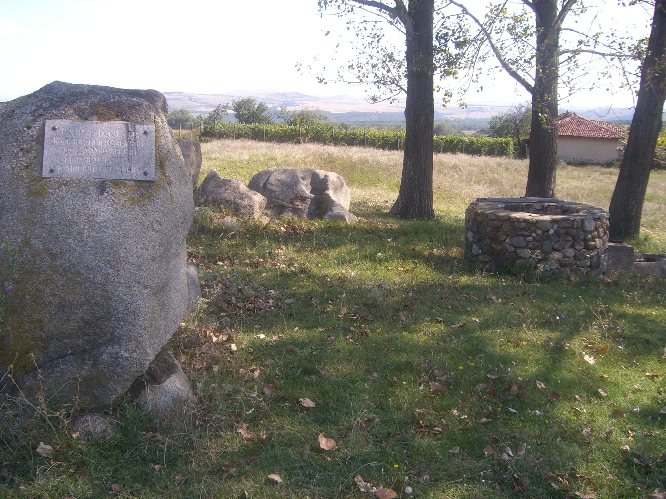 На това място през 1983 г. по случай тържественото чествуване на 60-годишнина от Септемврийското въстание бе поставена паметна плоча и възстановен някогашен кладенец.